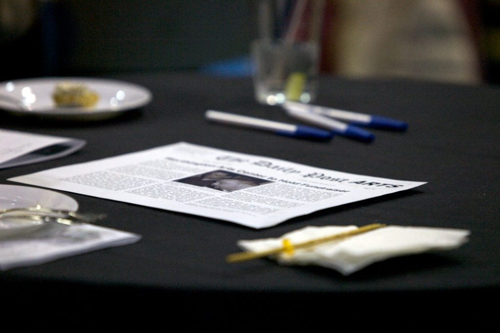 Art Imitates Death Murder Mystery